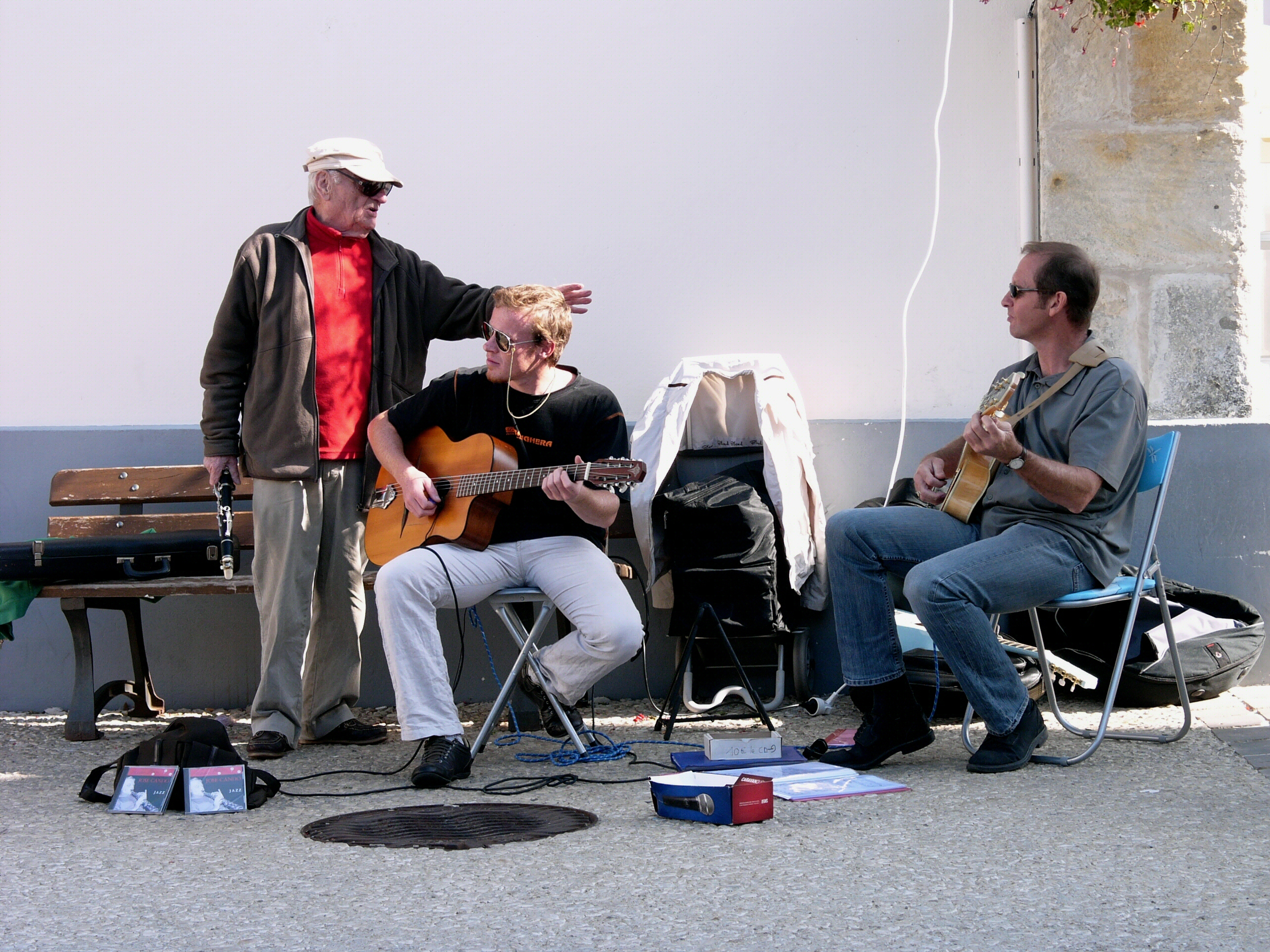 José Cando en compagnie de deux guitaristes place du Marché renommée depuis place José Cando Fouras Charente-Maritime France